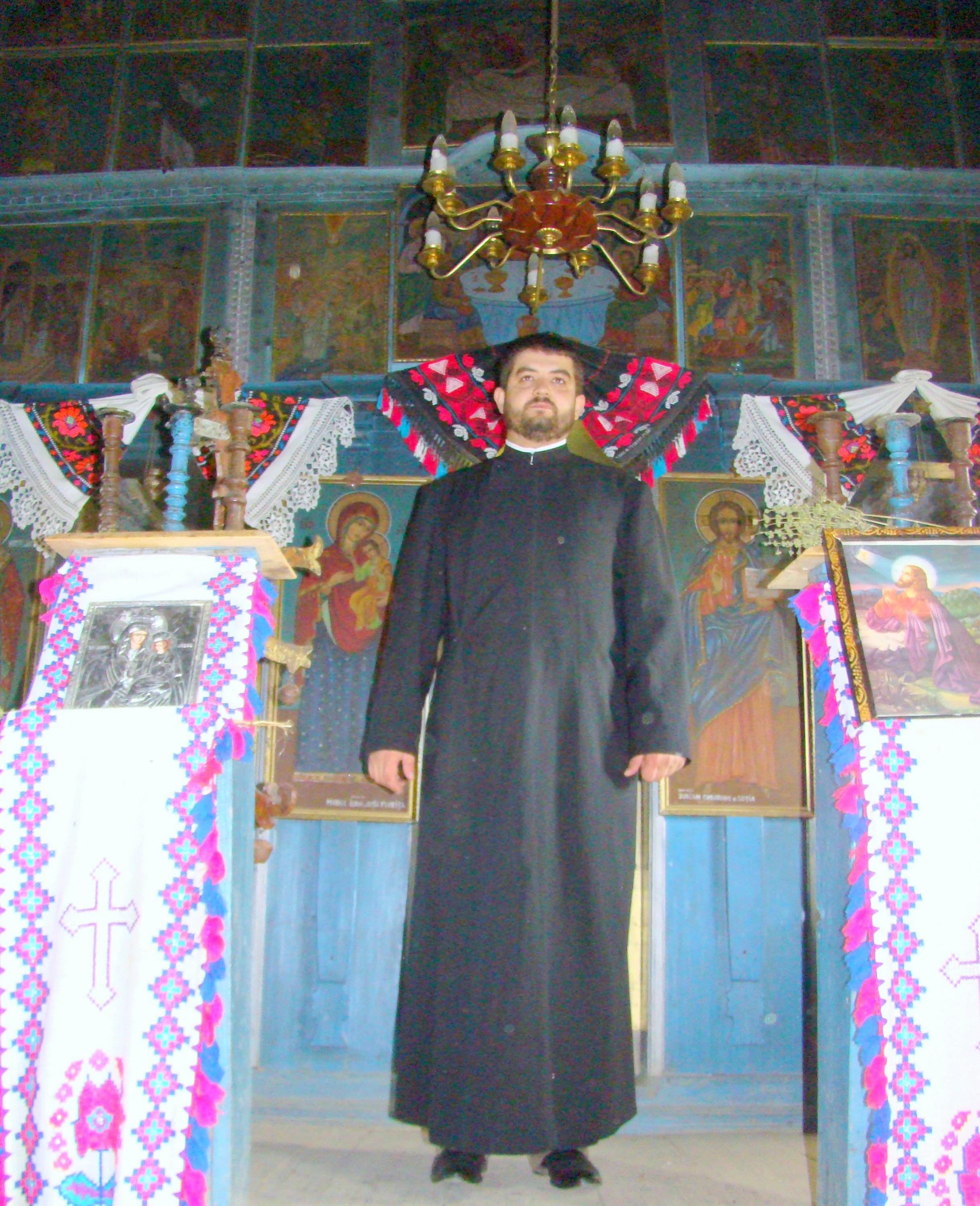 Biserica de lemn „Nașterea Maicii Domnului” din Săucani, județul Bihor